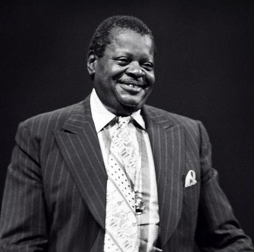 Oscar Peterson in 1977